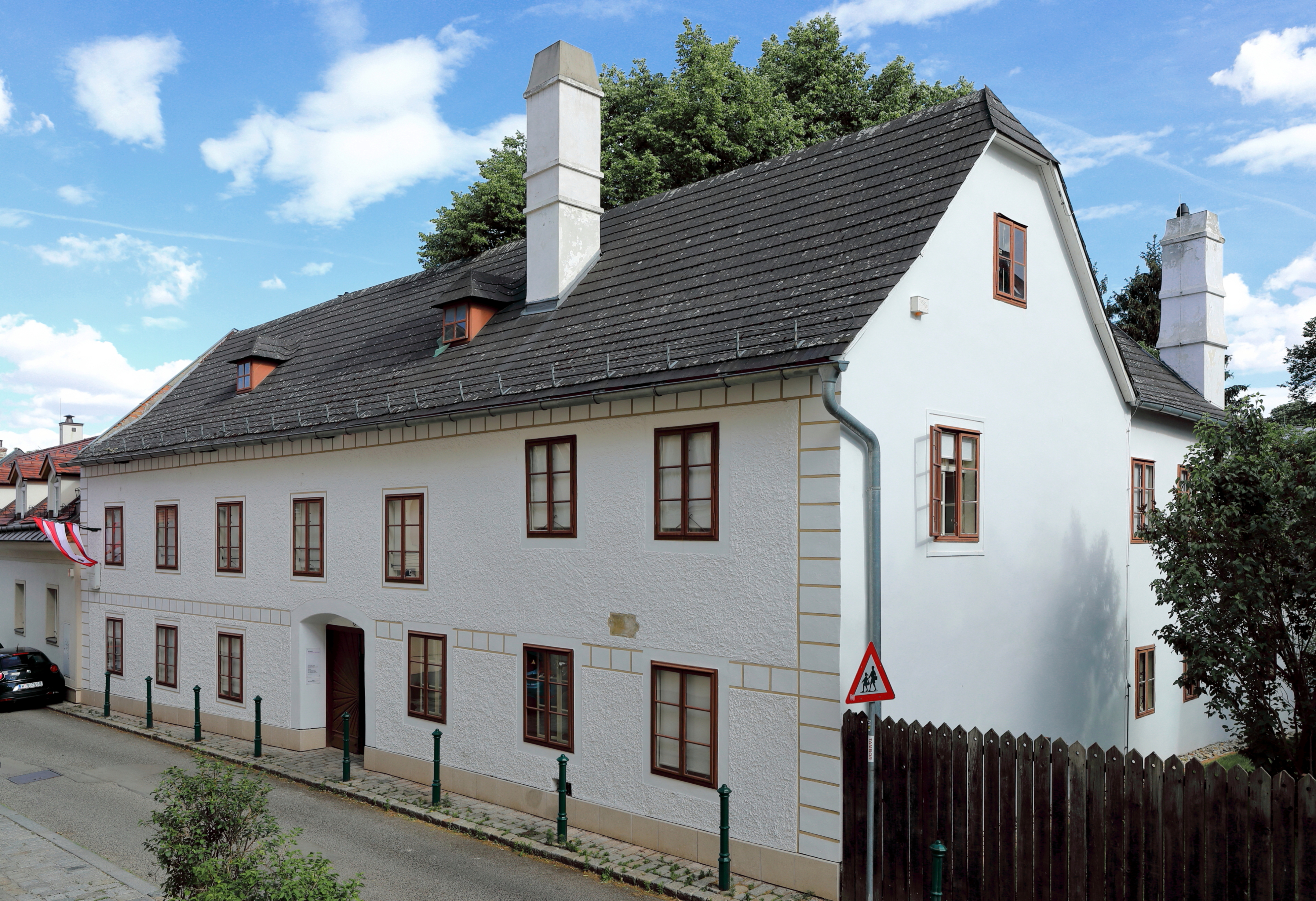 Das Haus an der Adresse Probusgasse 6 in Heiligenstadt, ein Wiener Stadtteil im 19. Bezirk Döbling, in dem Ludwig van Beethoven das sogenannte Heiligenstädter Testament verfasste.Das Haus wurde 1967 von der Stadt Wien angekauft, die darin eine Gedenkstätte einrichtete. 2017 wurde das Haus renoviert und von einer 40 m² umfassenden Gedenkstätte zu einem 265 m² großen Beethoven-Museum erweitert, das von Museen der Stadt Wien betrieben wird.